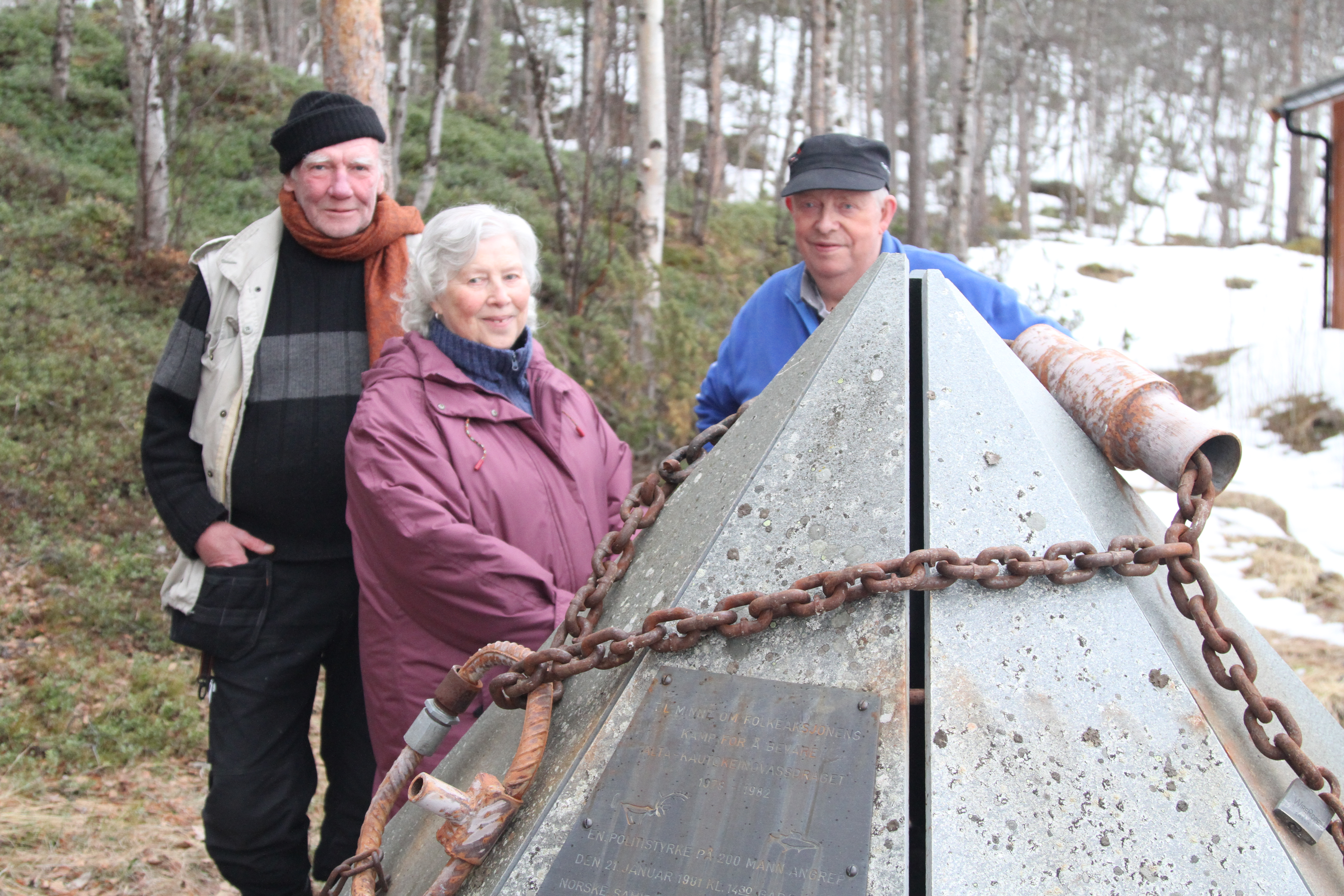 Johan Bergström, Bjørg Larsson och Halvard Larsson vid Elvereddernes skiferbauta i Gargia i april 2012. Länkarna är från Nollpunkten i Stilla.